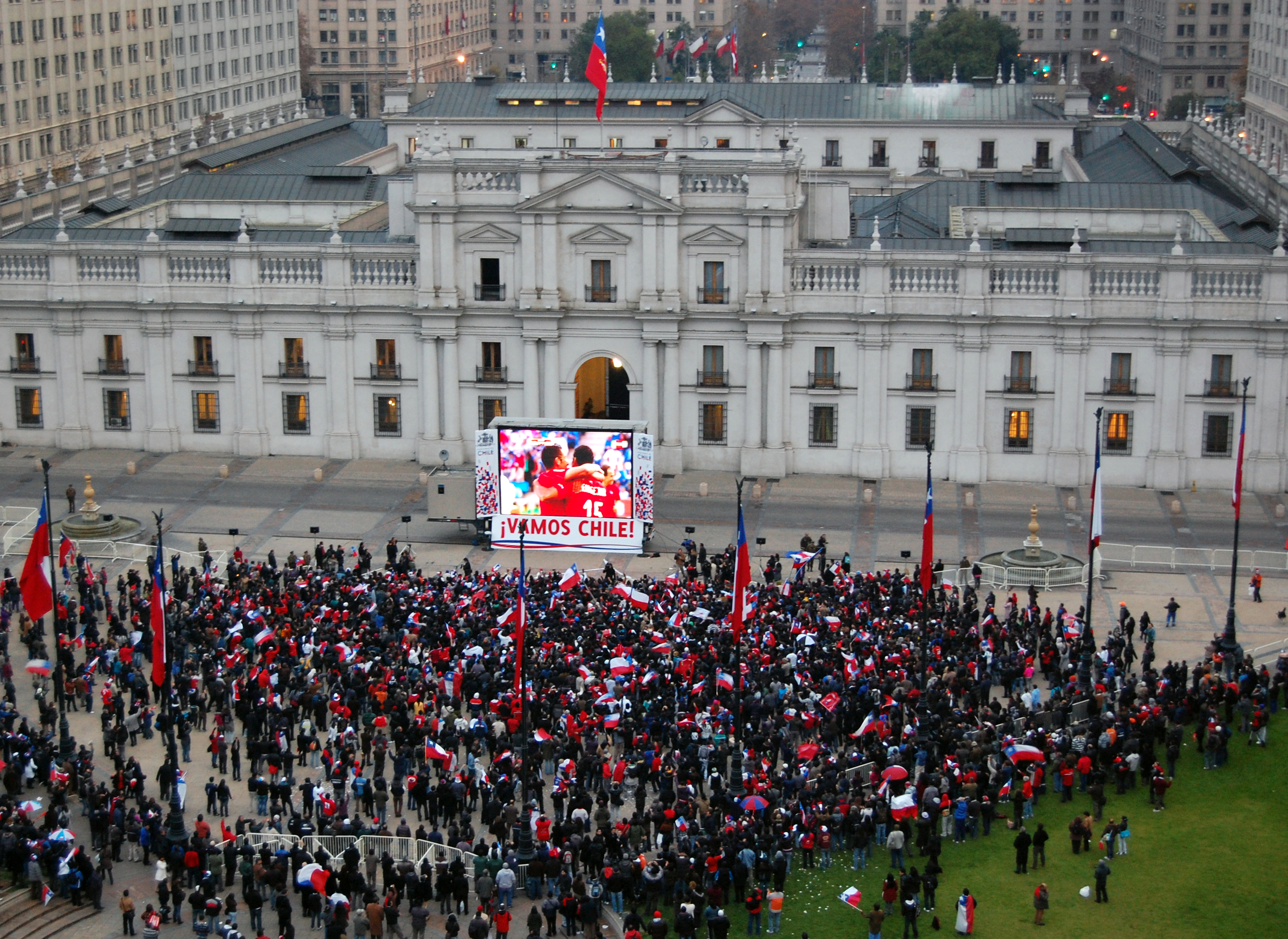 Cientos de hinchas de la selección de fútbol de Chile se juntan frente al Palacio de La Moneda (en la Plaza de la Constitución) cerca de las 9:00 AM del 16 de julio de 2010, celebrando el gol de Jean Beausejour en el partido entre Honduras y Chile en la Copa Mundial de Fútbol de 2010.